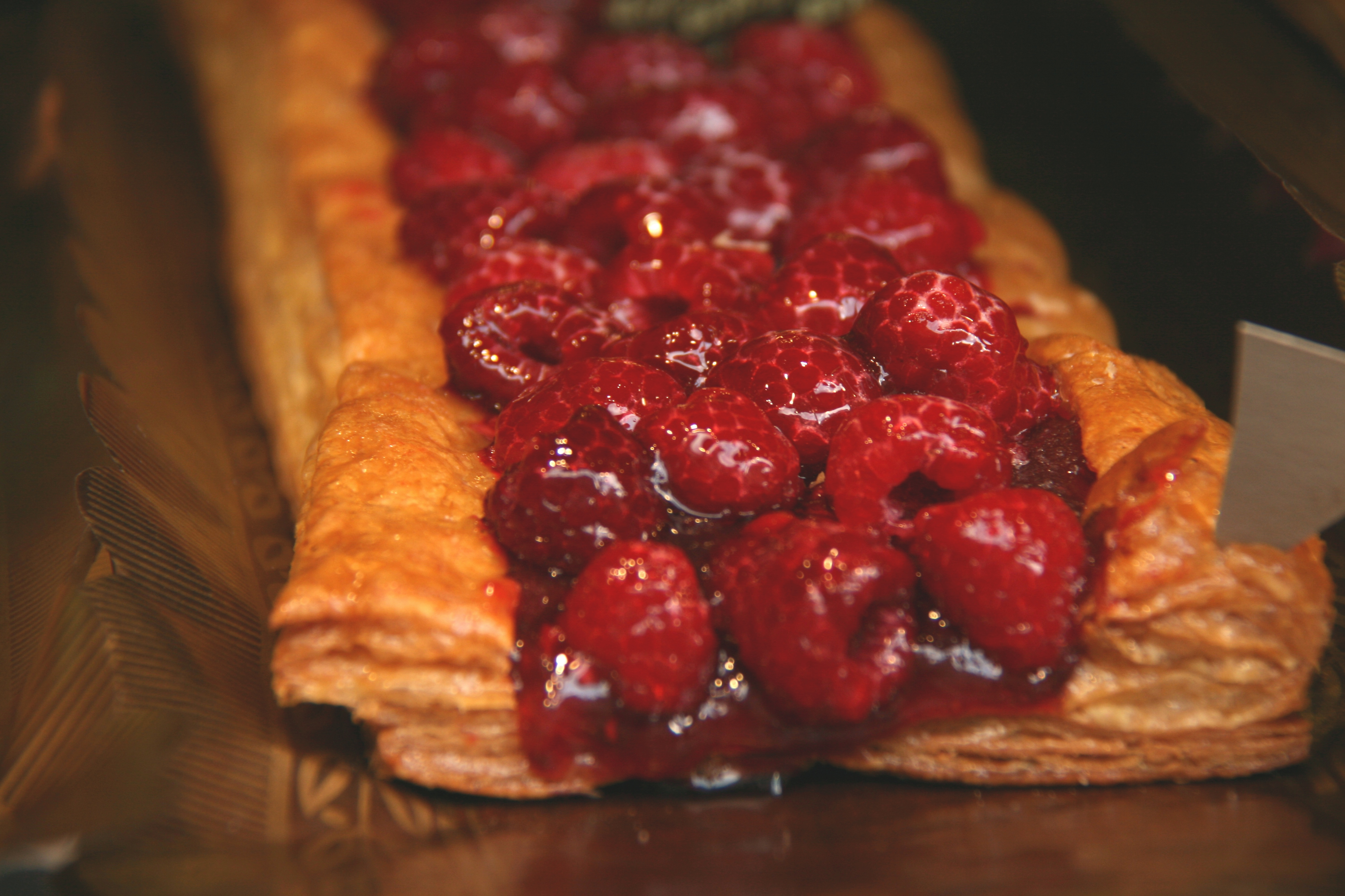 Hojaldre recubierto de frambuesas